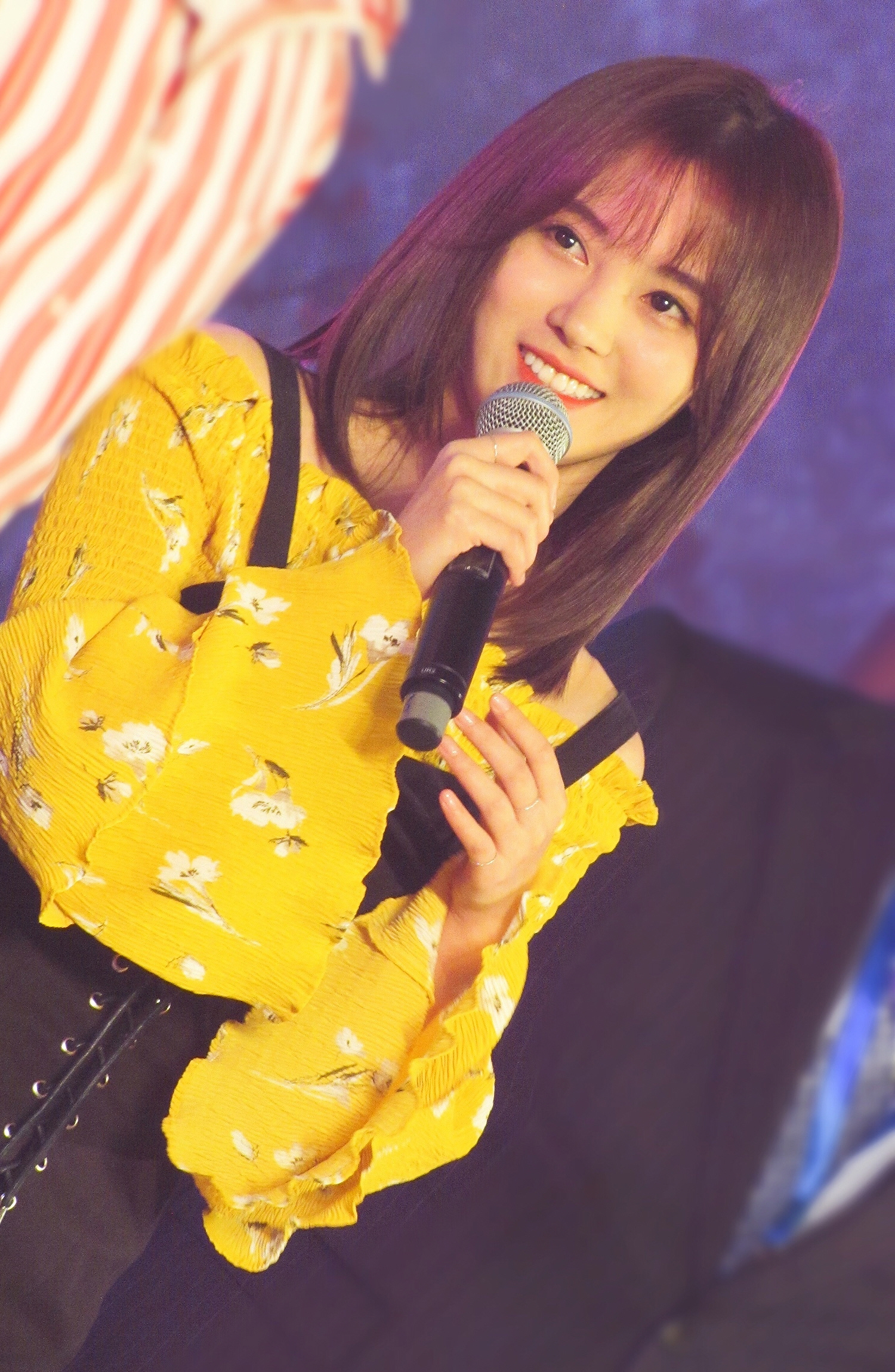 鞠婧祎 (2017)